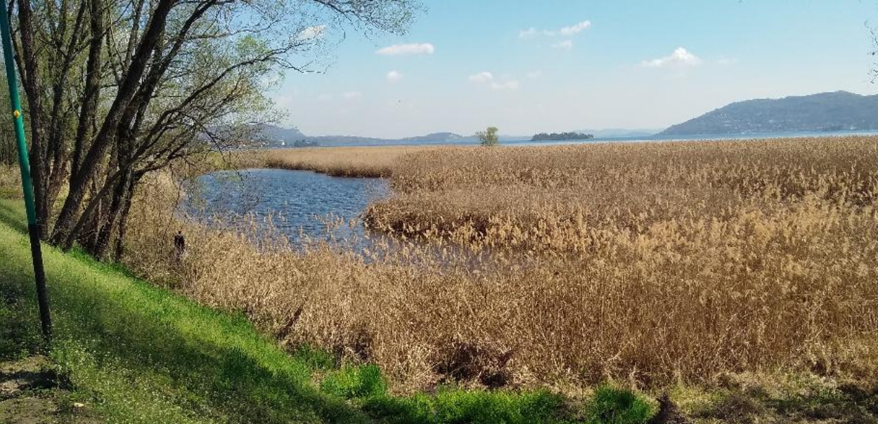 Fondotoce (VB): canneti